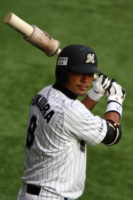 日本プロ野球 千葉ロッテマリーンズ 福浦和也 内野手